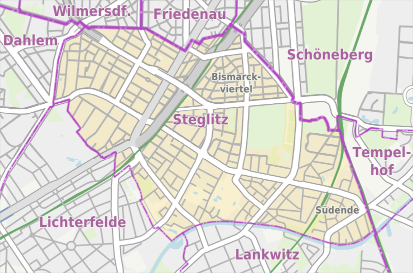 Übersichtskarte der Straßen und Ortslagen in Berlin-Steglitz